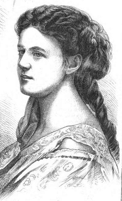 Pauline Ulrich, deutsche Schauspielerin im 19. Jh. (Dresdner Hoftheater).